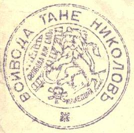 Печат на войводата на ВМОРО Тане Николов.